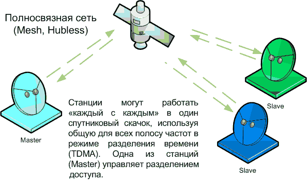 Схема спутниковой сети Mesh